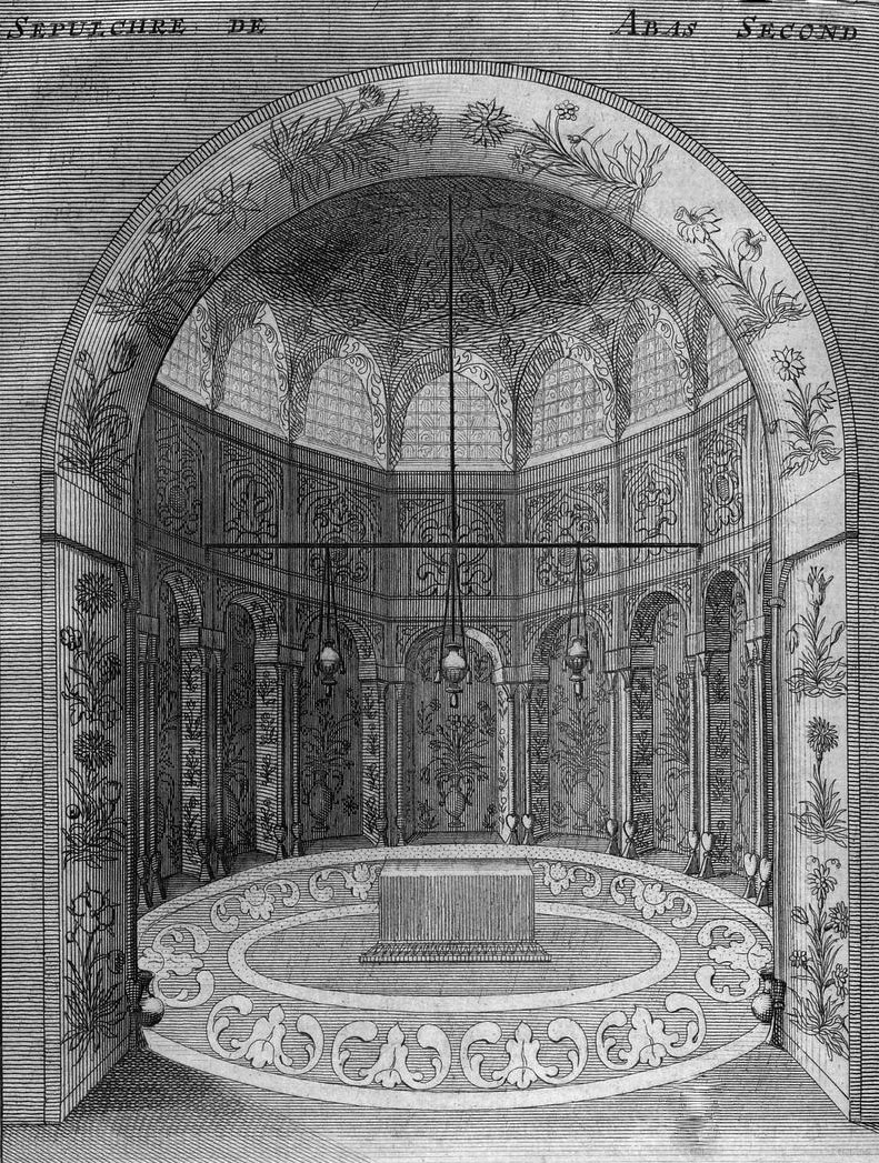 Sépulcre de Abbas II of Persia , Tome 3. p.73